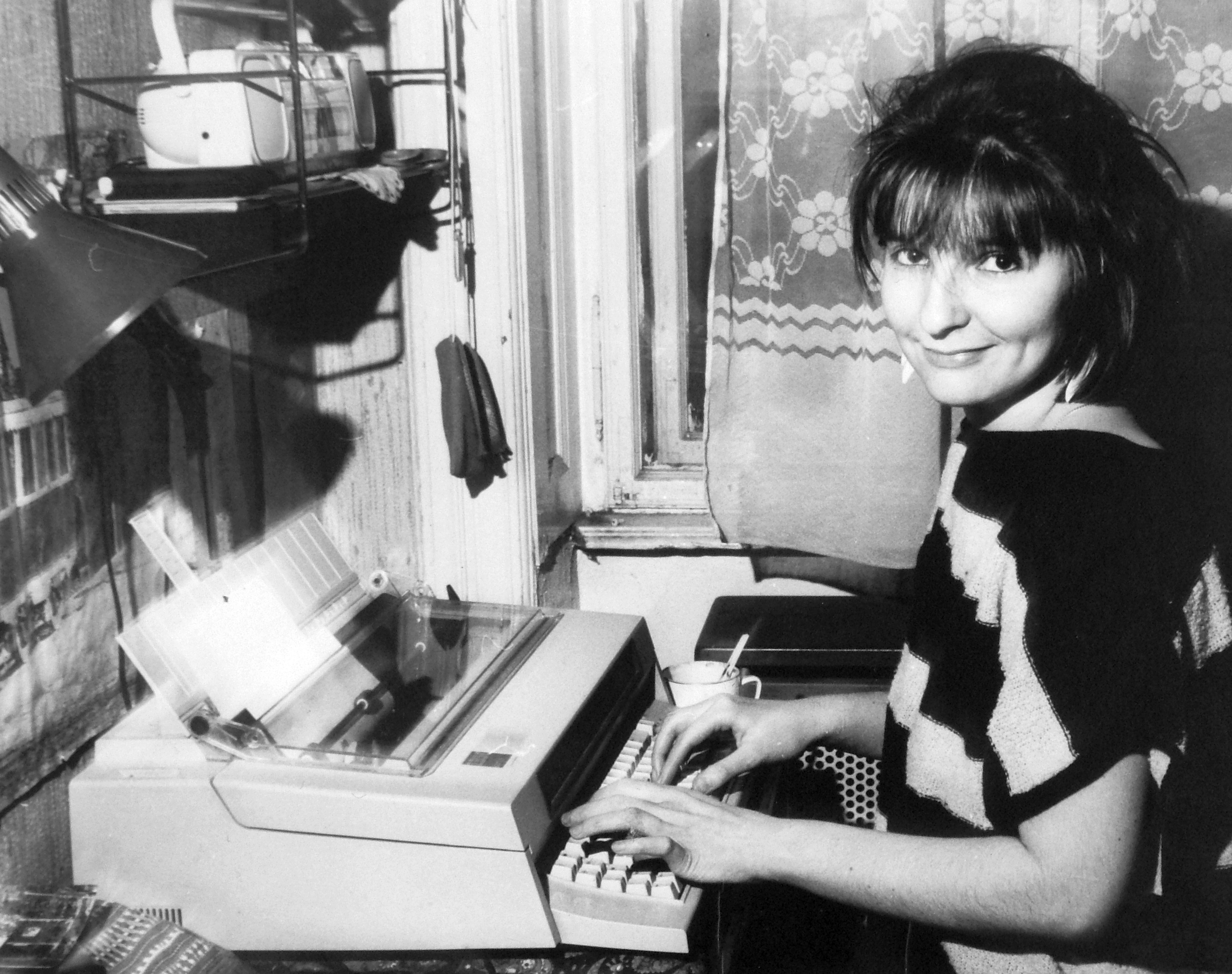 Vágner Anna, az illegális Beszélő folyóirat gépírónője. Location: Hungary Tags: cold war, typewriter Title: Vágner Anna, az illegális Beszélő folyóirat gépírónője.